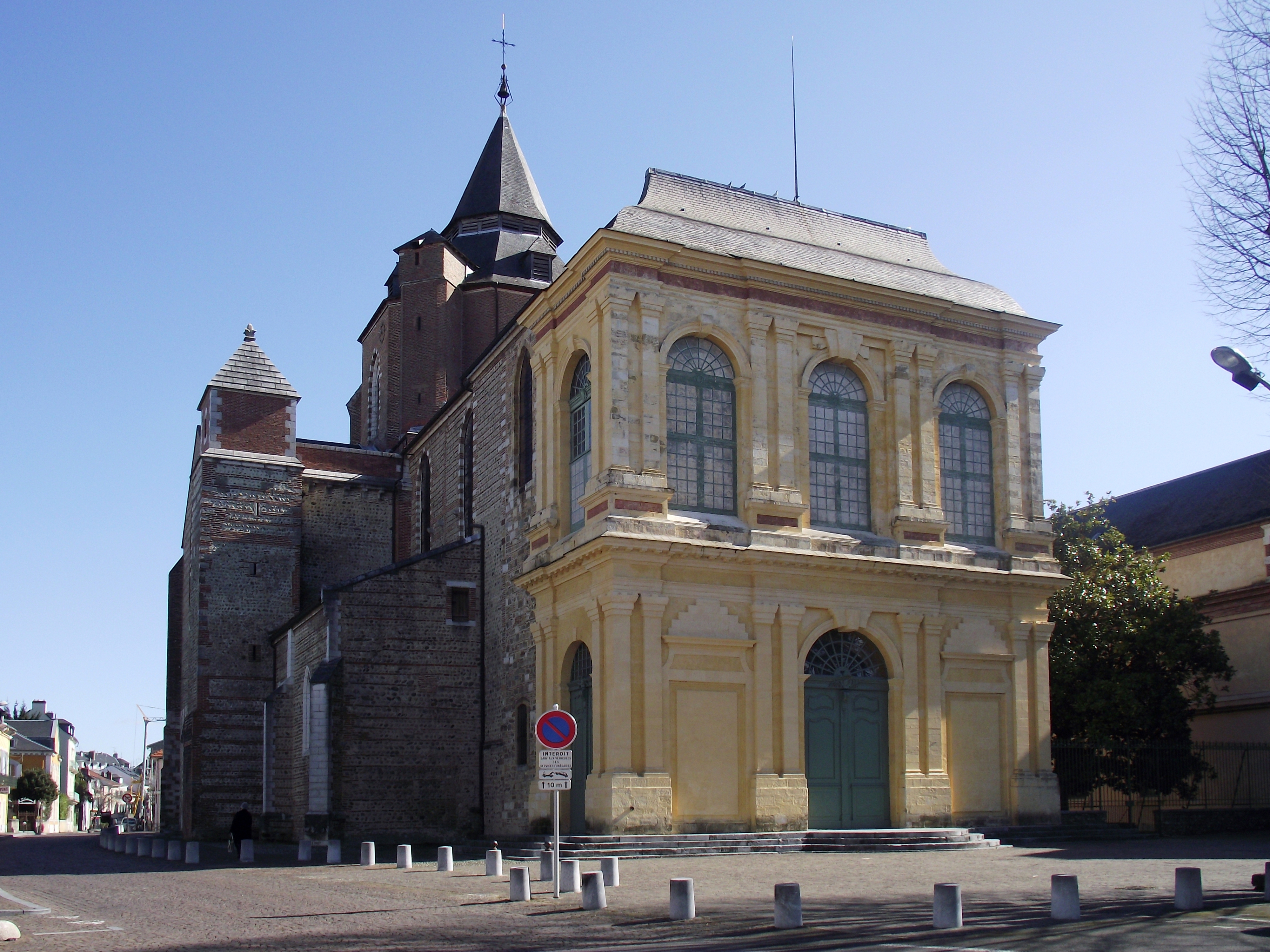 Cathédrale Notre-Dame-de-la-Sède de Tarbes (Hautes-Pyrénées, France).